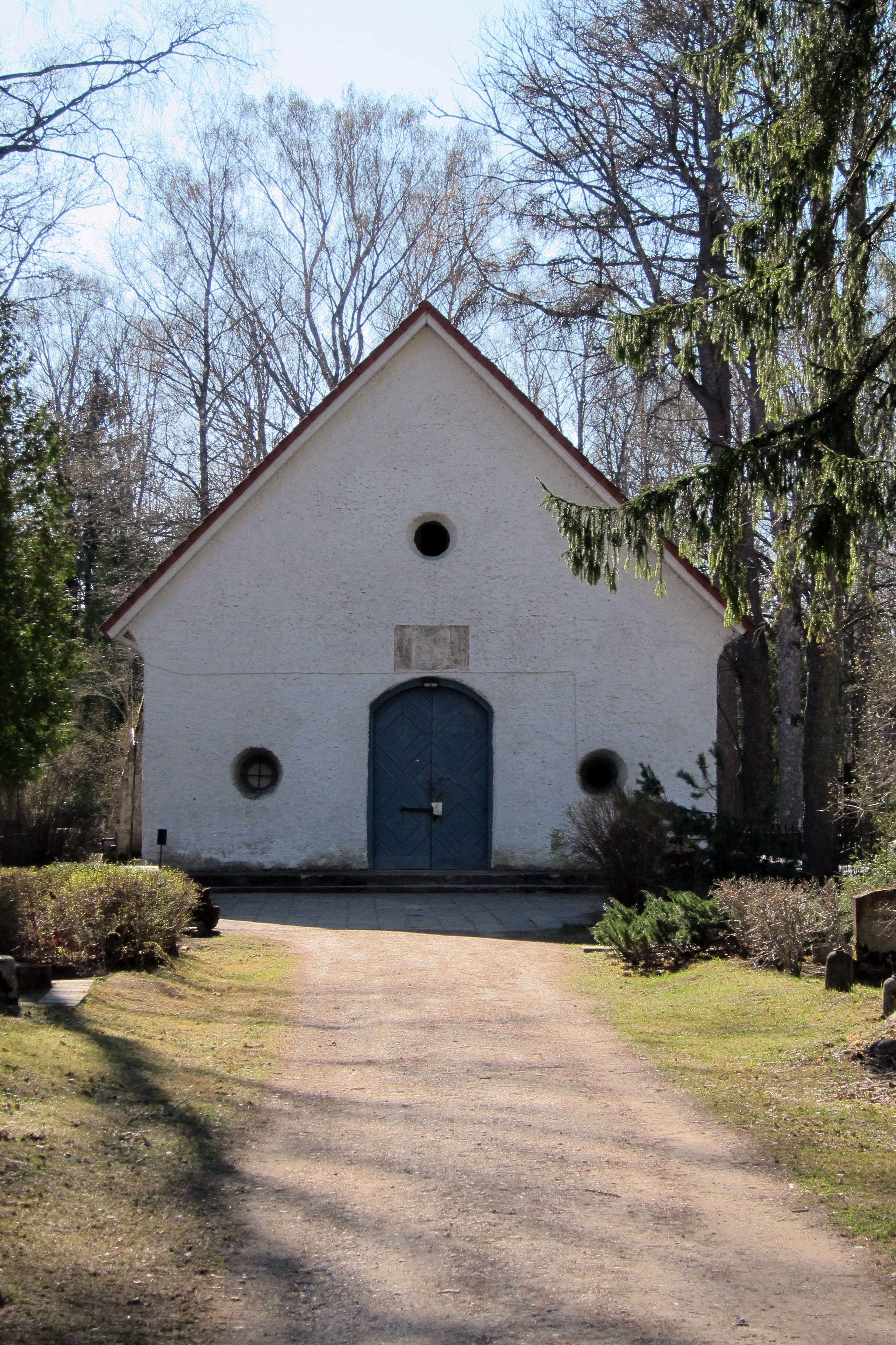 Rapla kalmistu kabel